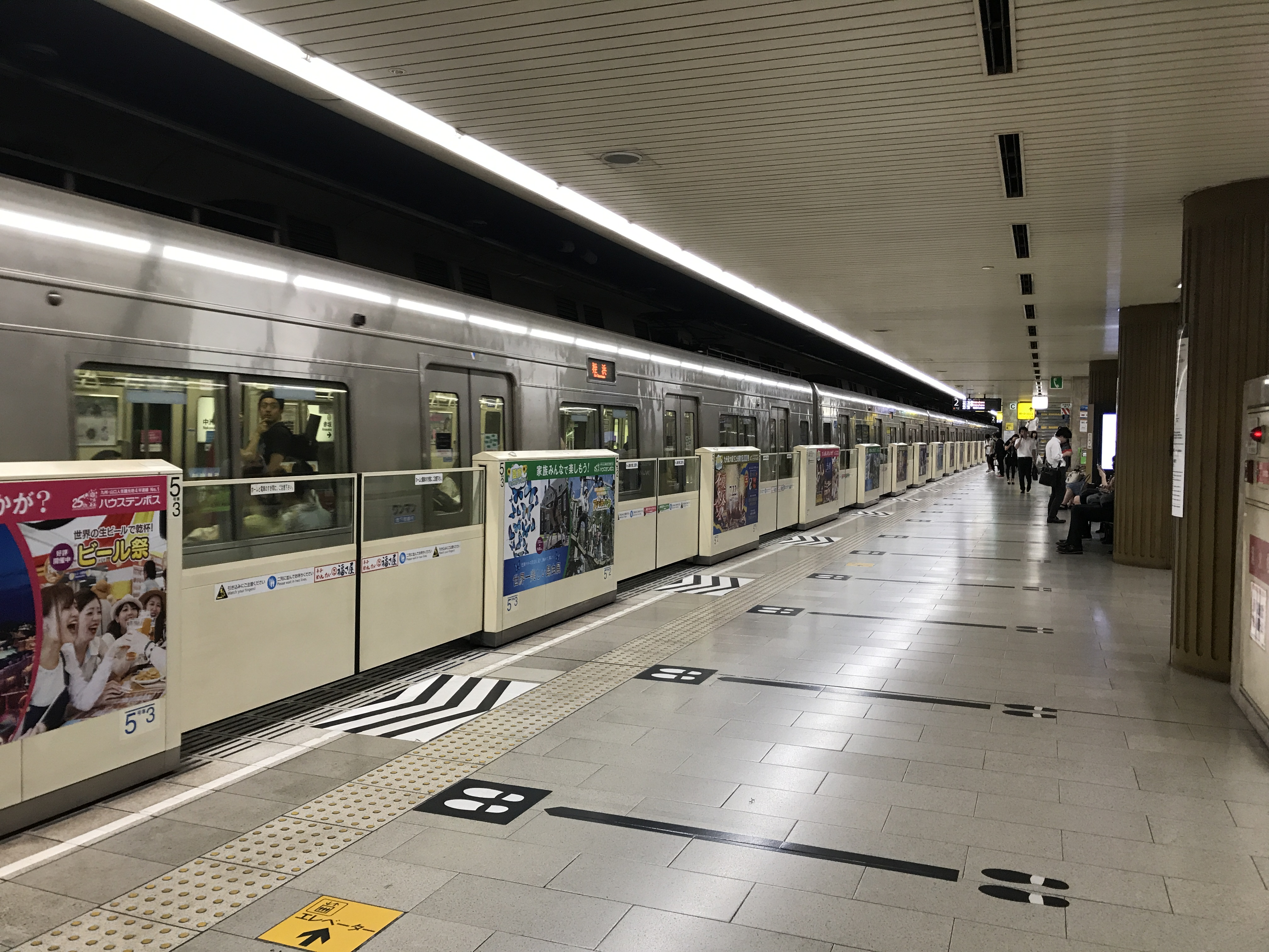 天神駅のホーム